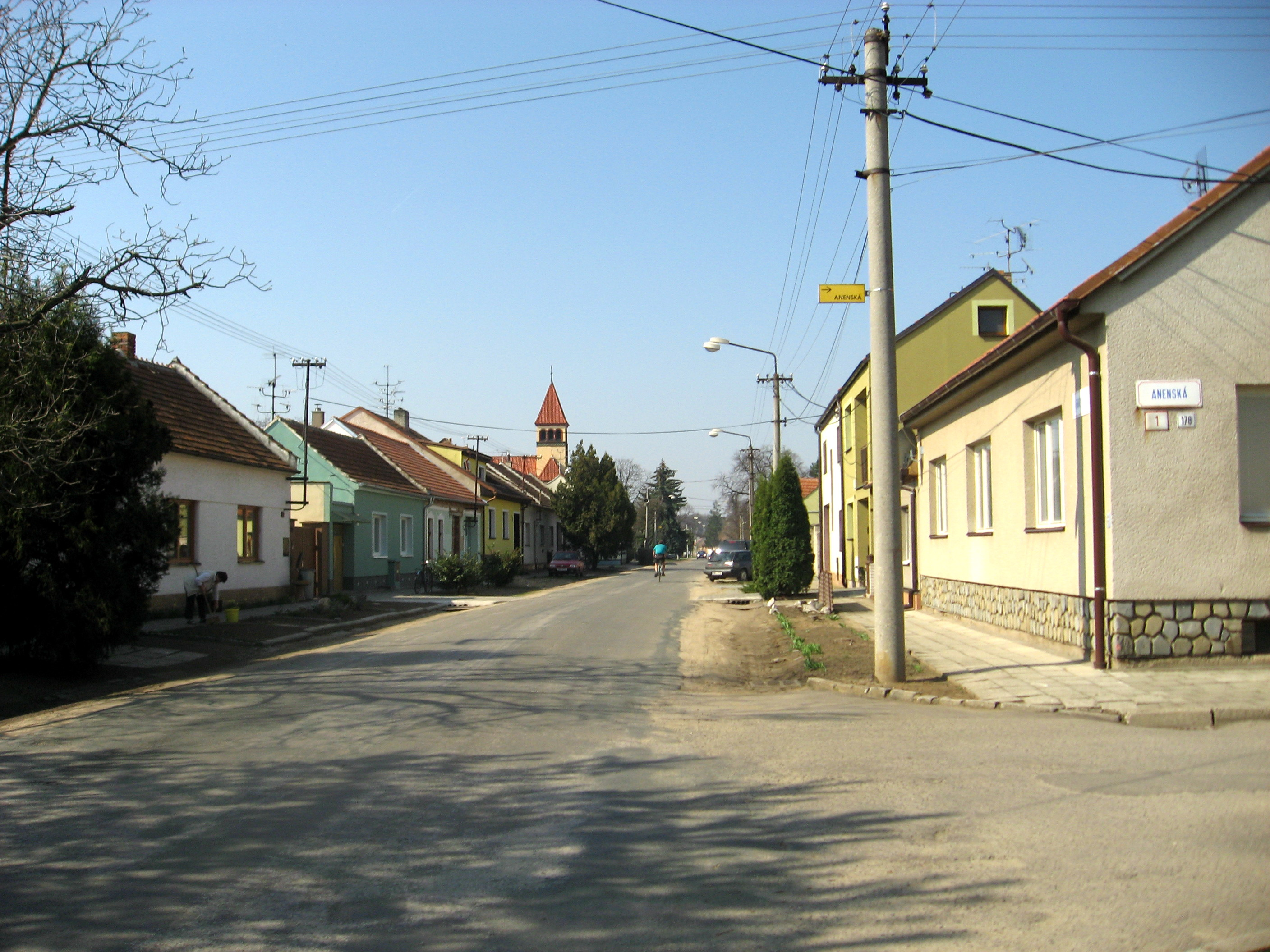 Ladná